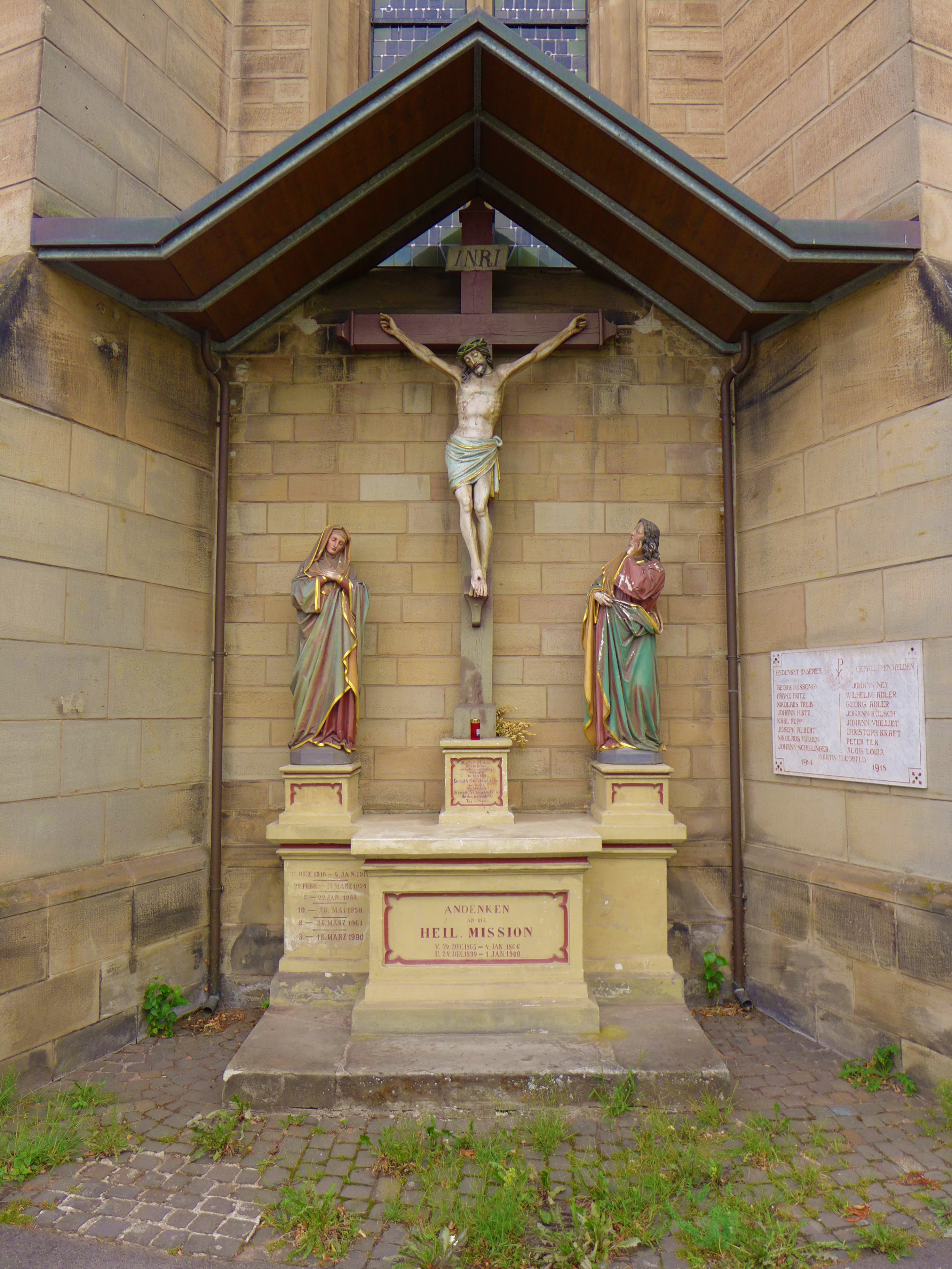 St. Katharina (Wallerfangen), Missionskreuz